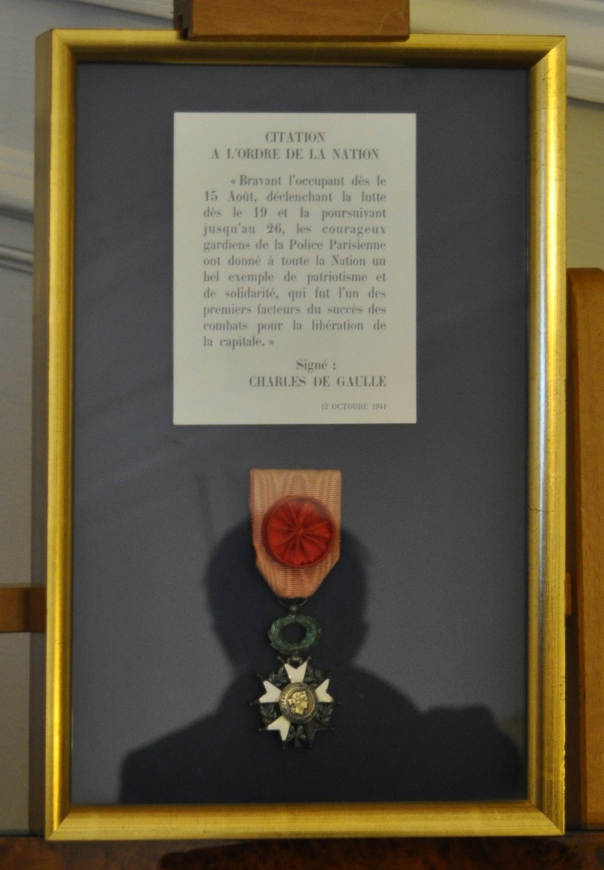 Citation à l'ordre de la nation et légion d'honneur de la préfecture de police de Paris, décernes par le général de Gaulle. Exposées dans la salle de billard des appartements préfectoraux de la préfecture de police de Paris. Cette salle est ouverte au public pour la deuxième fois en 2015. Photo prise lors des journées européennes du patrimoine 2015.